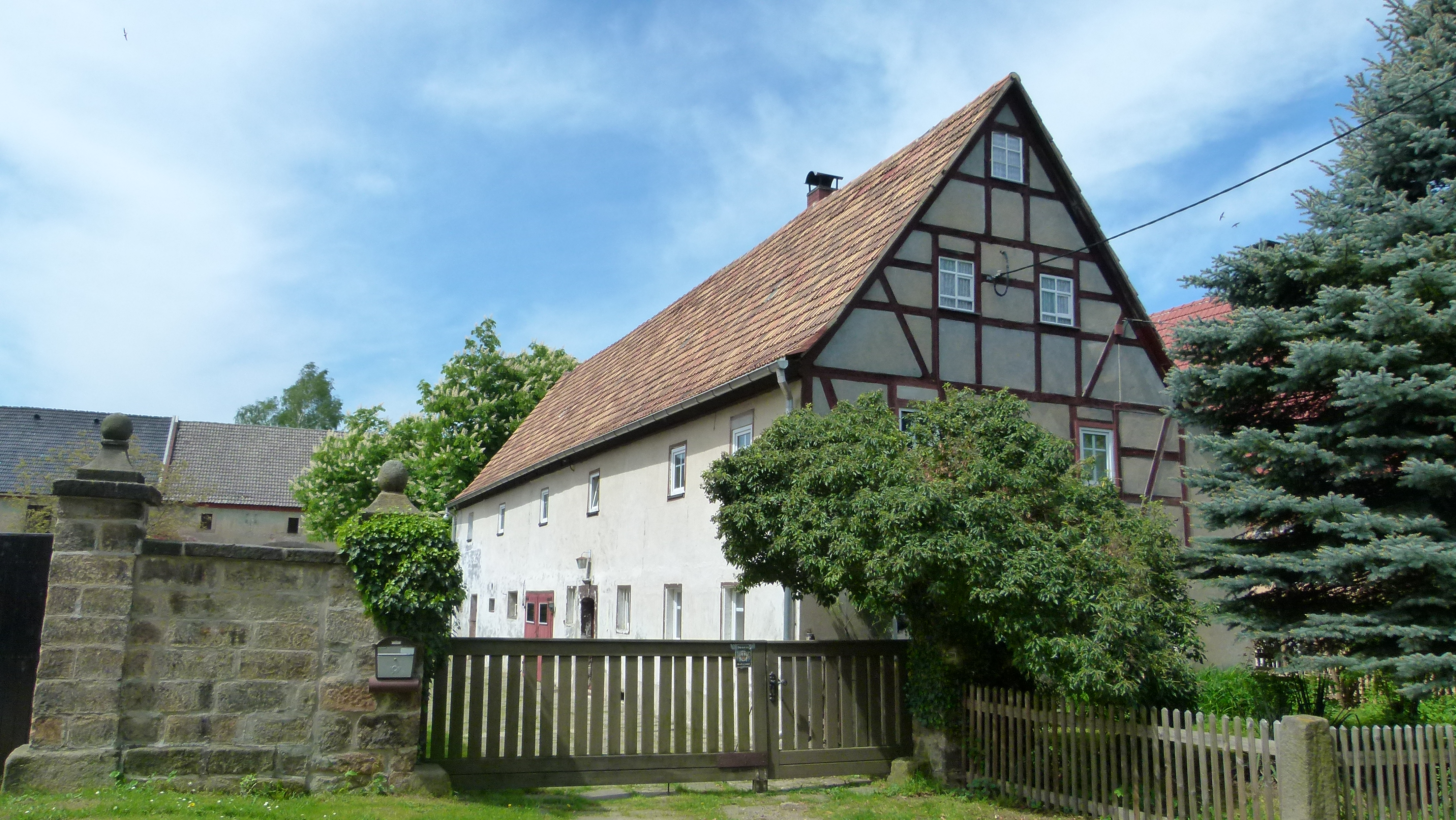 Denkmalgeschütztes Wohnstallhaus, Am Anger 14, Doberzeit, Lohmen